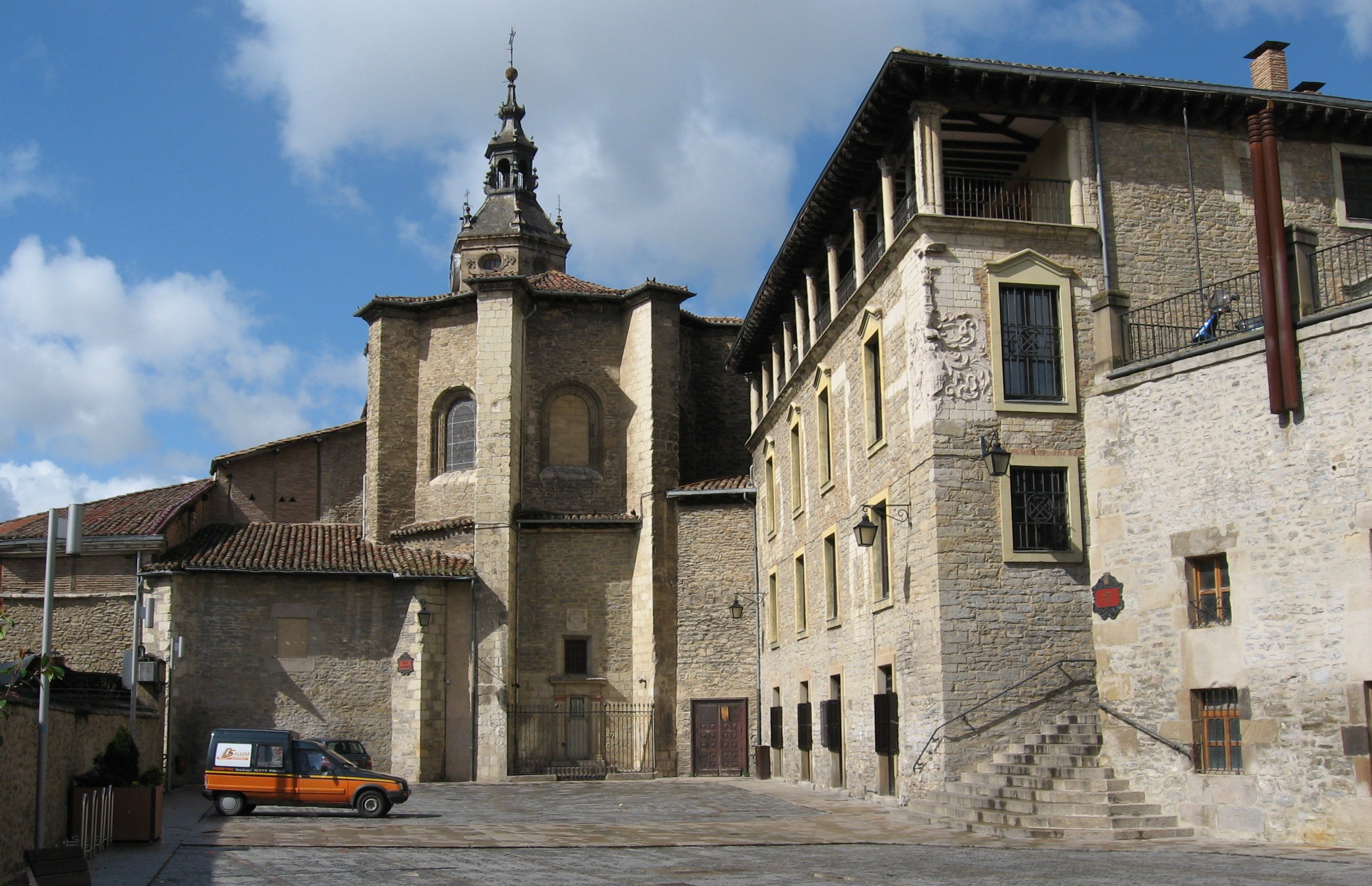 Desc: Plaza del Machete en Vitoria-Gasteiz.